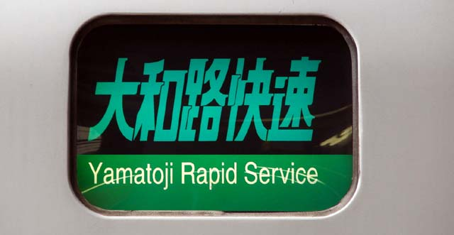 大和路快速幕